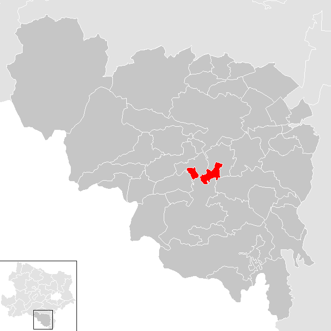 Bezirk Neunkirchen